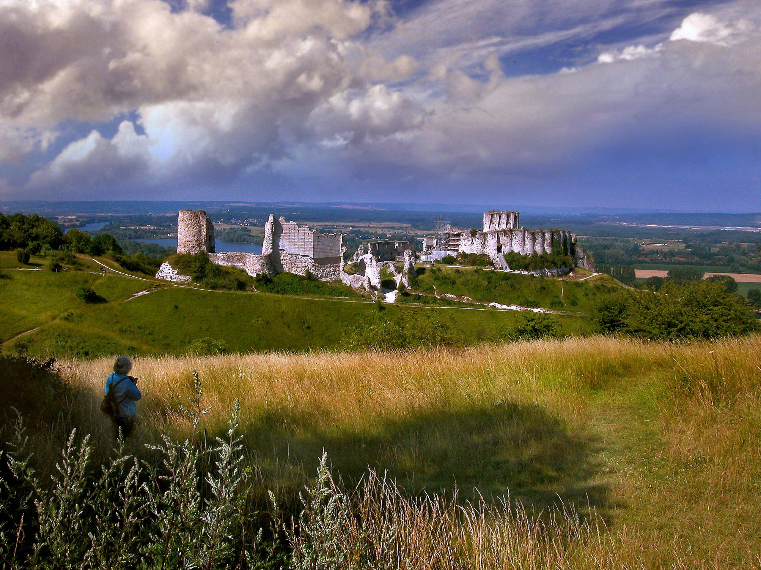 Château Gaillard (ClasséClasséClasséClassé) .